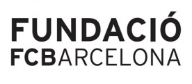 logo fundación